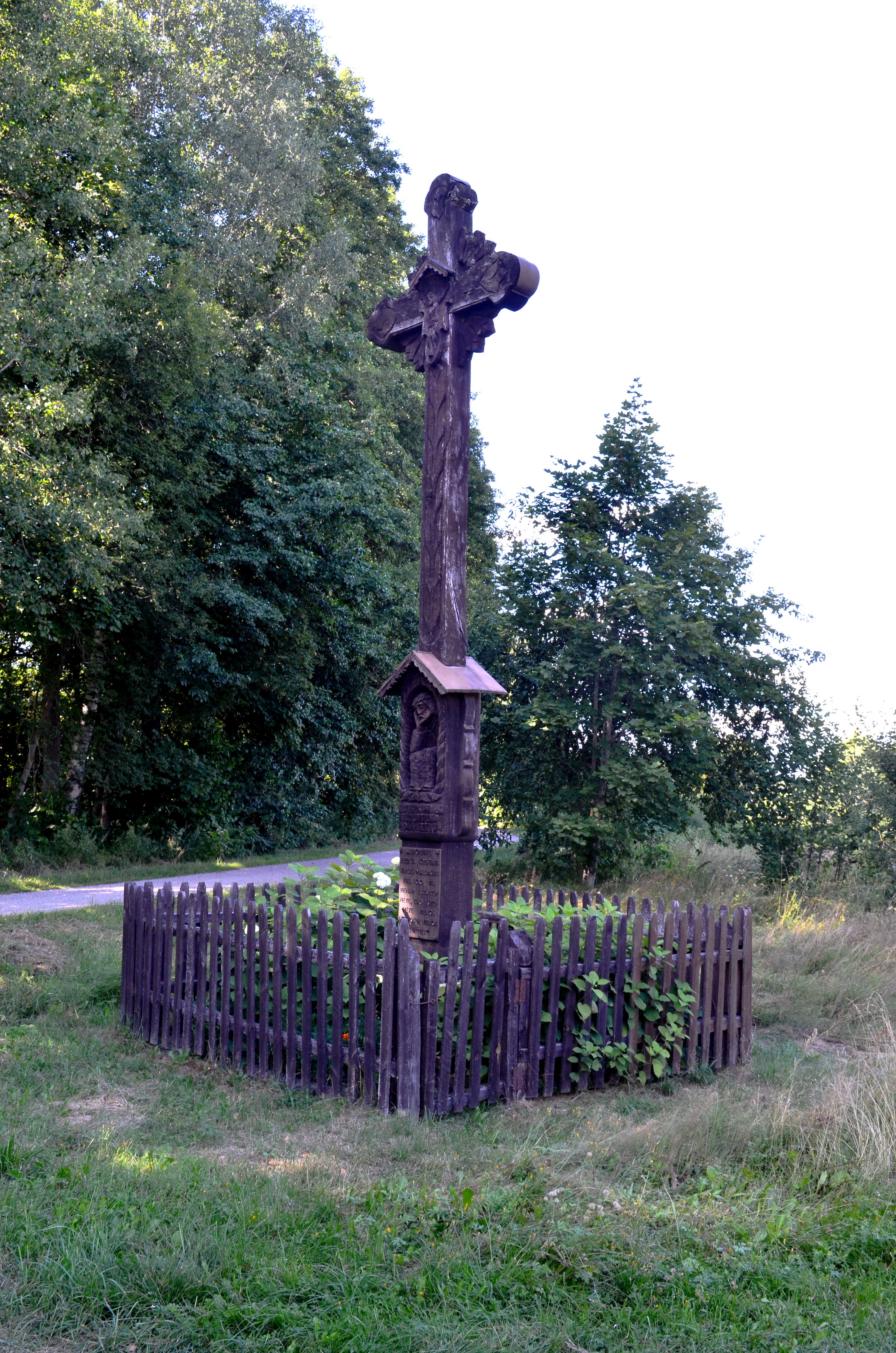 Kryžius 1944 m. Joninių žudynių aukoms, Musteika, Varėnos r.